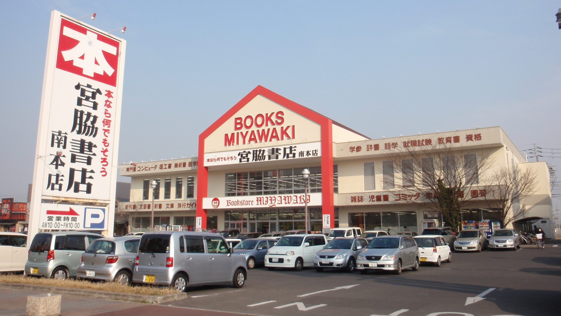 香川県高松市にある宮脇書店の南本店。